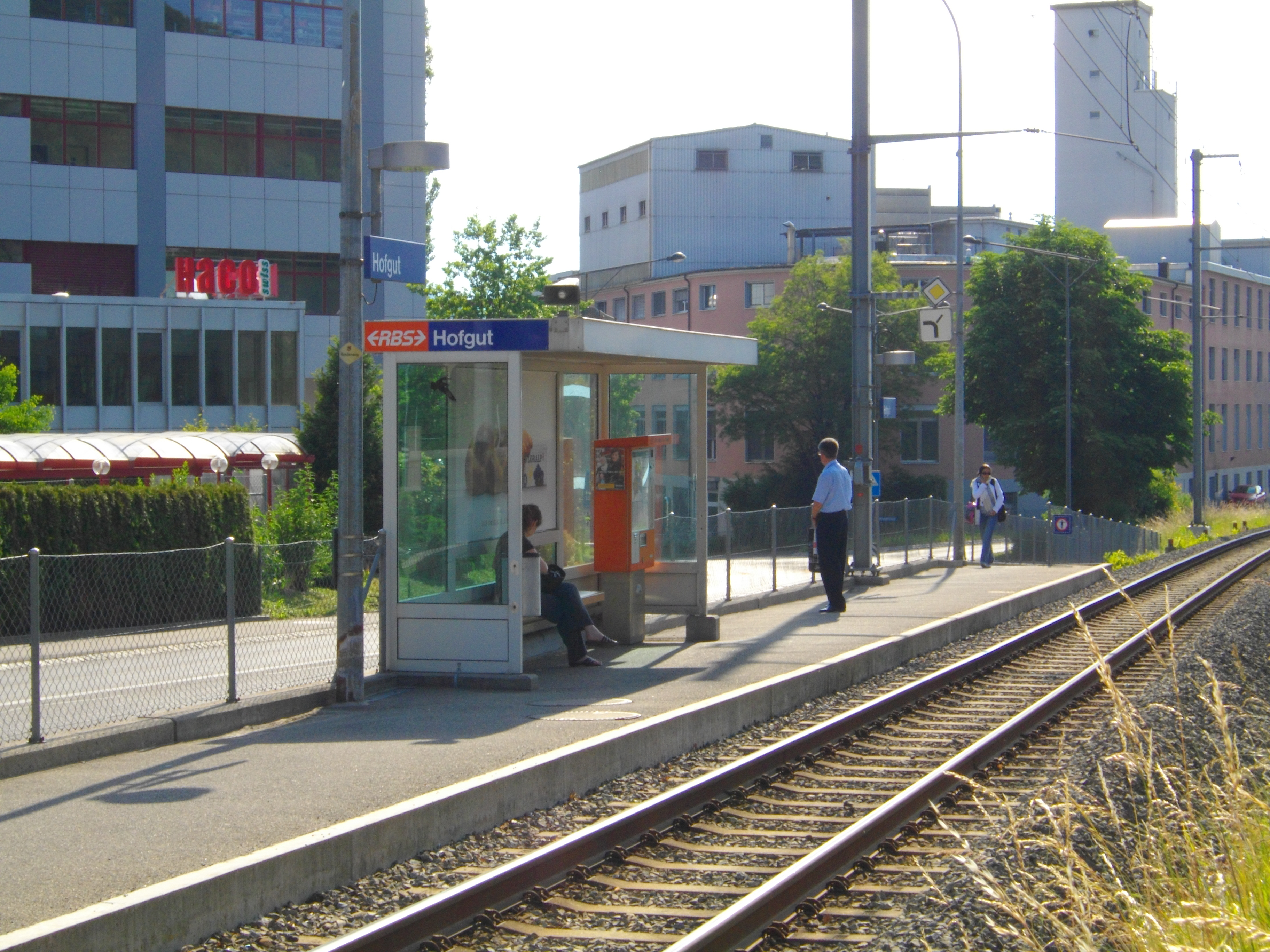 Hofgut: Parada del tram en Gümligen